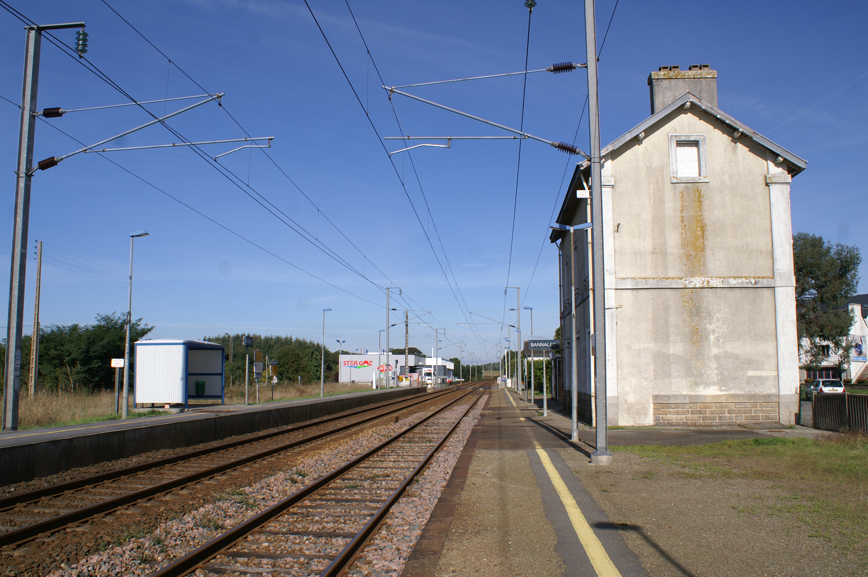 Gare de Bannalec, les voies en direction de Quimper. A droite l'ancien bâtiment voyageurs aujourd'hui fermé.